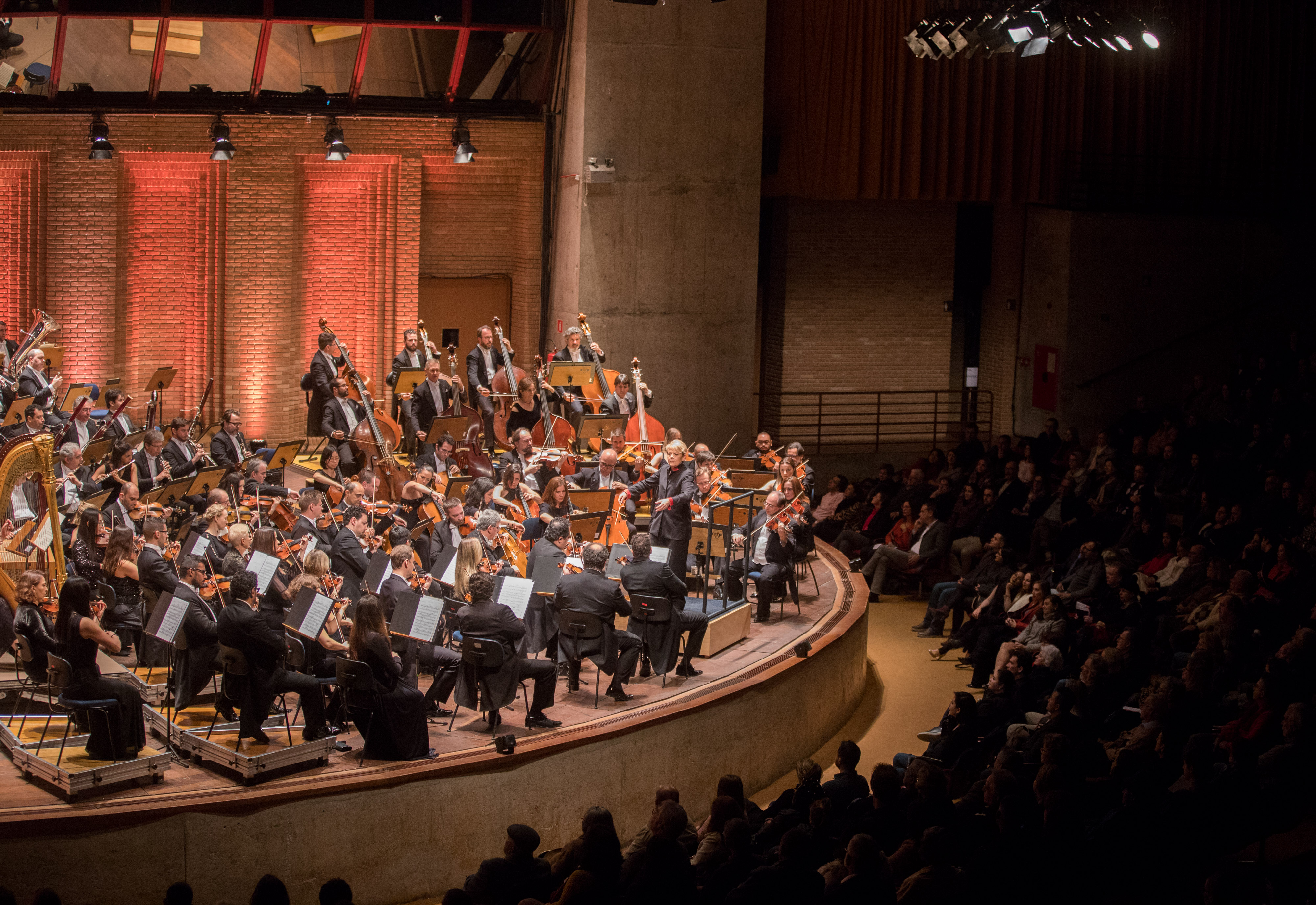 O Governador do Estado de São Paulo, Márcio França, participa da abertura do Festival de Campos do Jordão.Local: Campos do Jordão/SP Data: 30/06/2018 Foto: Governo do Estado de São Paulo.